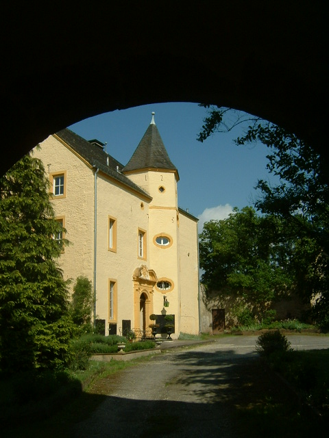 Roth an der Our, Schloss Roth, Ehemalige Komturei, 1733 erneuert, 1958 wiederaufgebaut